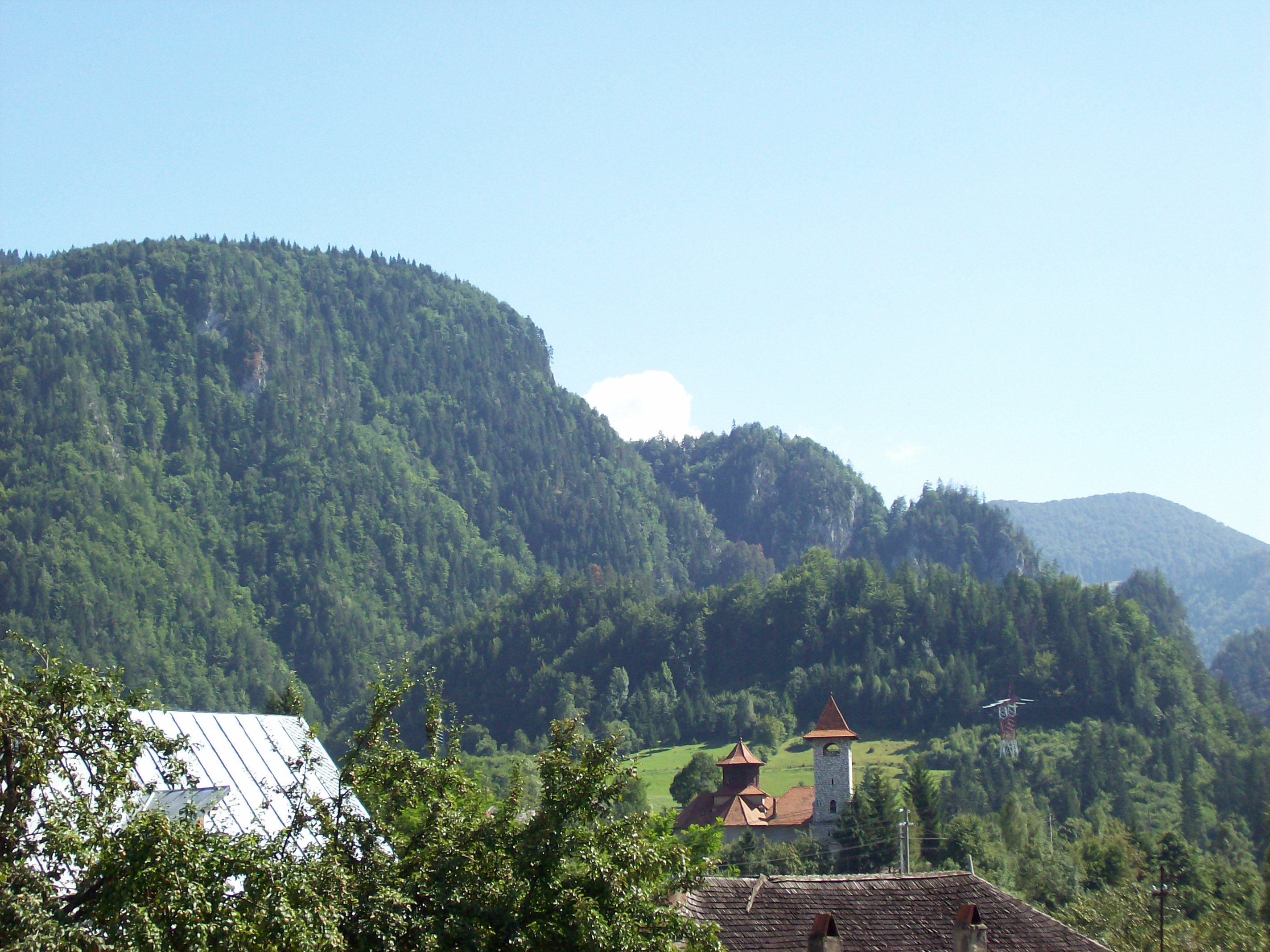 Zelfgemaakt. Zomer 2006. Pasul Bran. Roemenië